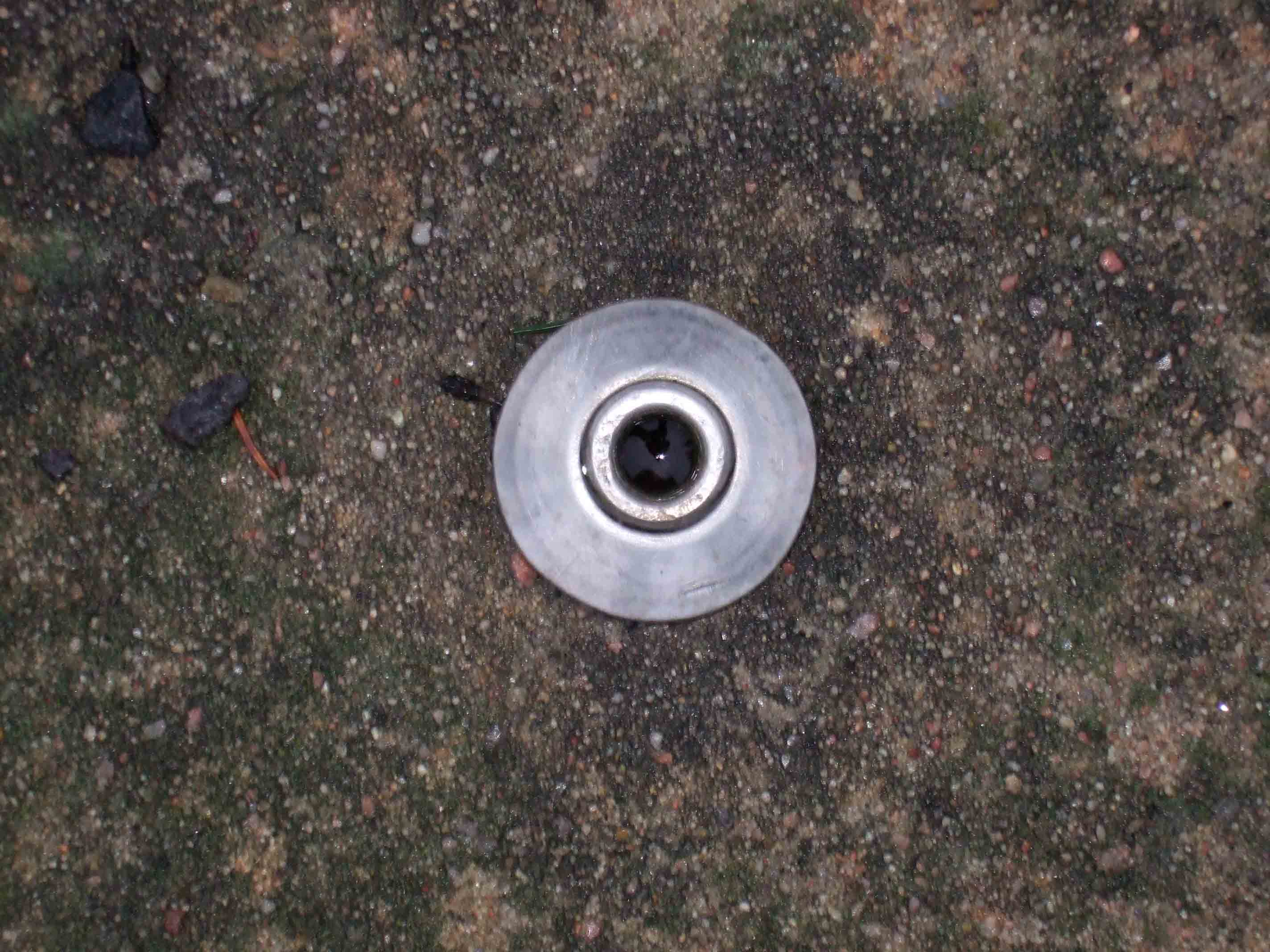 Benchmark, norwegian.